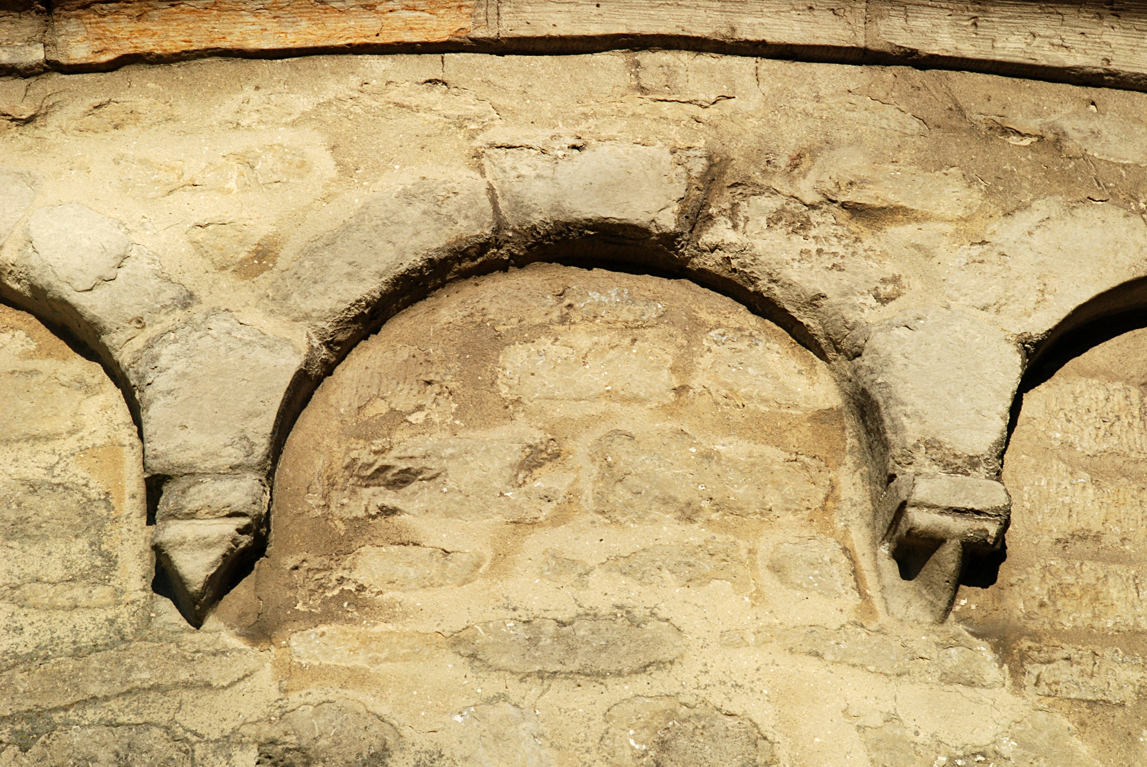 Belgique - Hainaut - Bons Villers - Frasnes-lez-Gosselies - Chapelle Notre-Dame du Roux